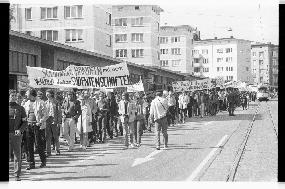 Das Bundesausbildungsförderungsgesetz (BAFöG), das das Honnefer Modell der Studienbeihilfe ablösen soll, bringt finanzielle Verschlechterungen für viele Studierende. Bannertexte v.l.: "SOLIDARISCH HANDELN mit dem VERBAND deutscher STUDENTENSCHAFTEN"; "Auch DICH erwischt der STROBEL-HOBEL". Neben den Demonstrierenden eine Straßenbahn der Linie 4, im Hintergrund Wohnblocks der sogenannten "Klagemauer".